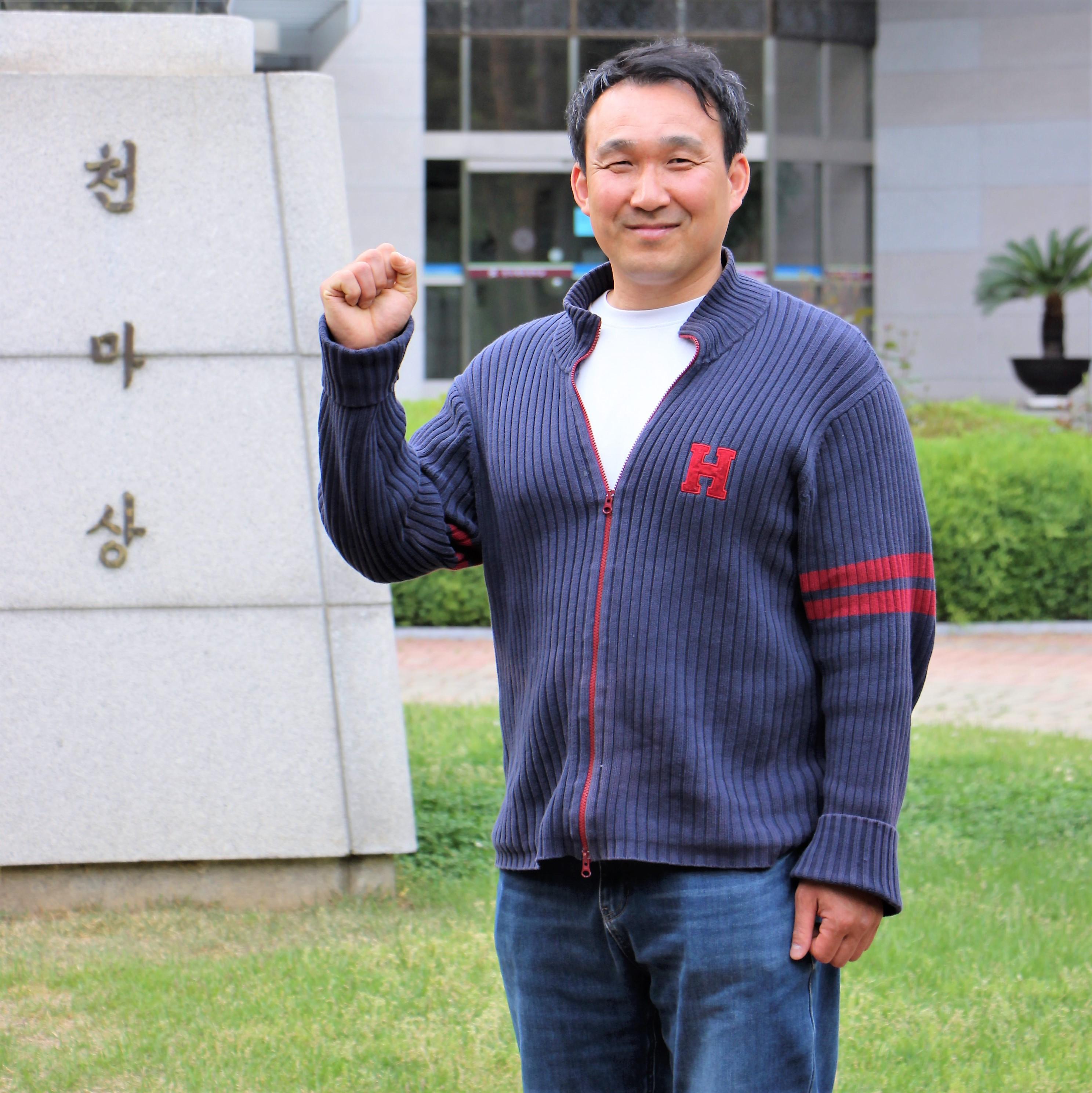 2020년의 강광배 전 선수, 현 교수의 모습.